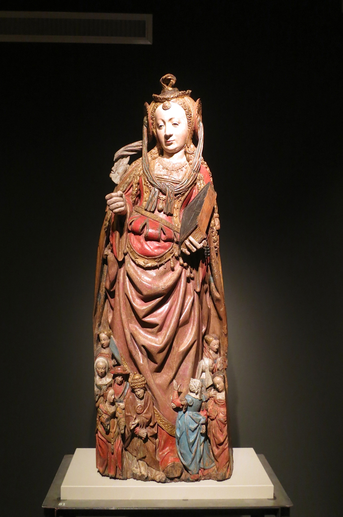 'Ursula en reisgenoten' (Utrecht, ca. 1530) van de Meester van de Utrechtse Stenen. Tentoonstelling: 'Ontsnapt aan de Beeldenstorm'.